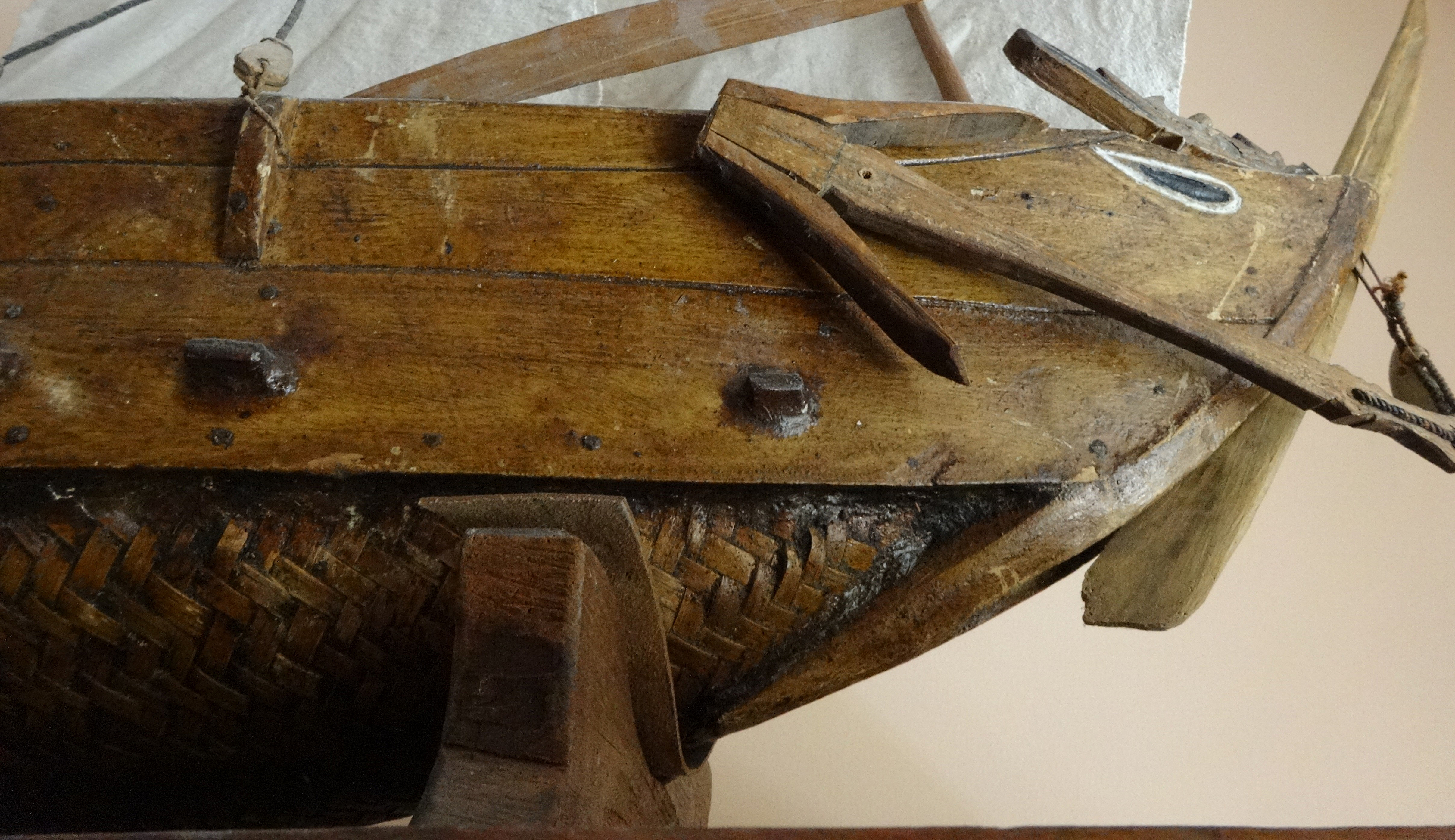 Maquette de bateau de la région de Tourane (actuellement Da Nang), Annam, ancienne Indochine, Viêt Nam. 1ère moitié du XXe siècle.